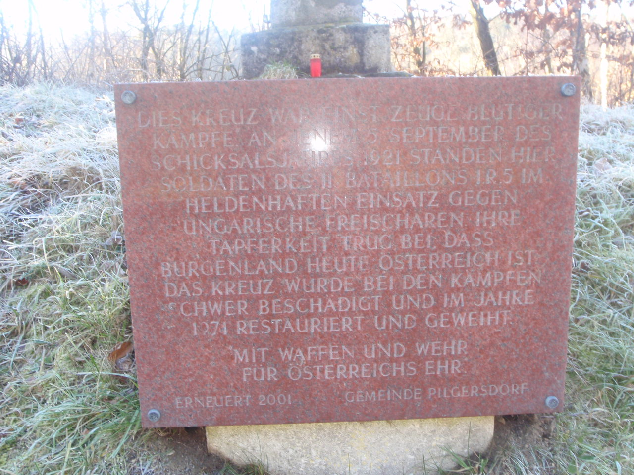 Pilgersdorf/Pörgölény; Nyugat-magyarországi felkelés emléktáblája Kirchschlag felől a B55 főút mentén, a történelmi országhatárnál